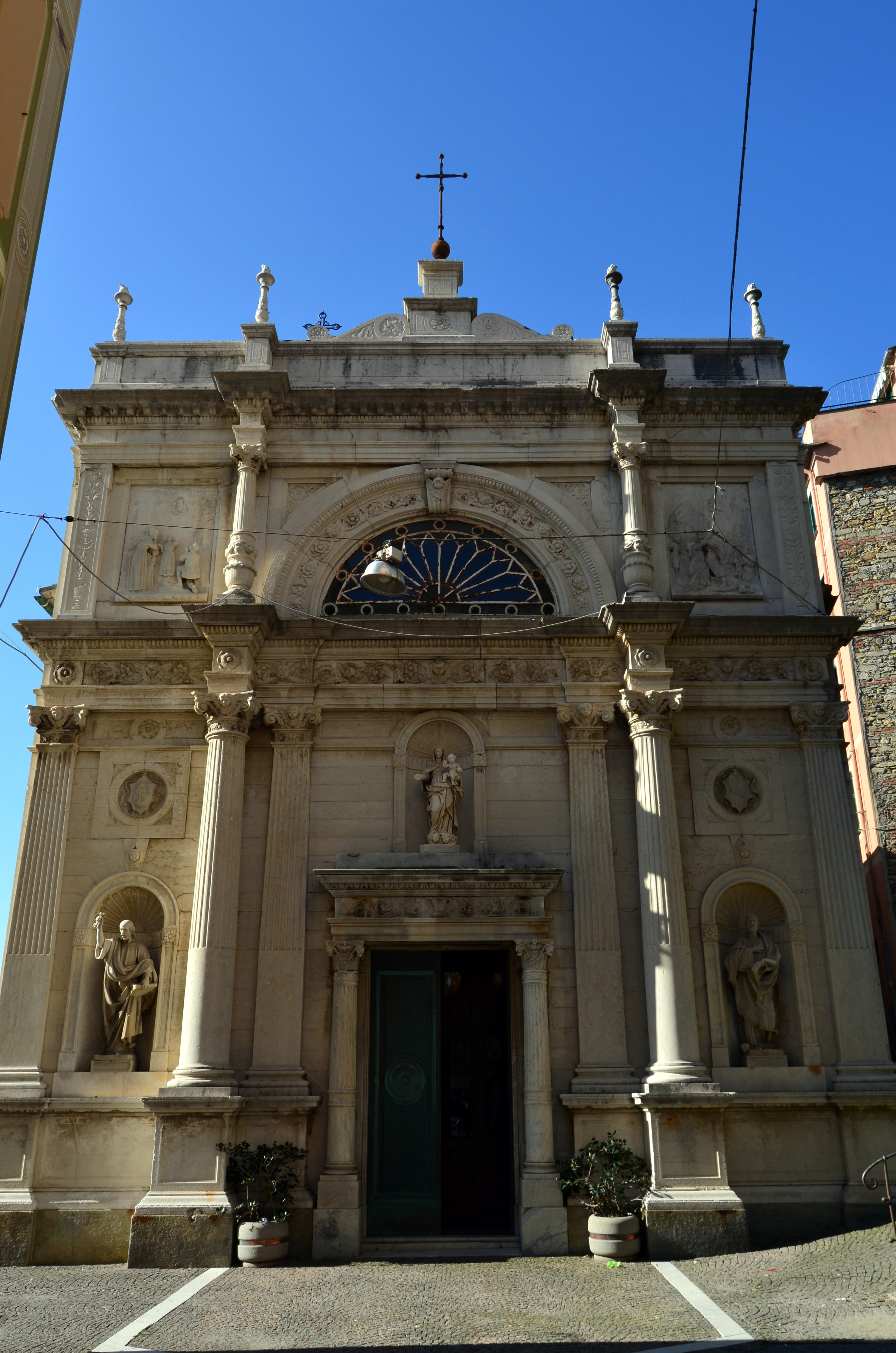 Oratorio di Santa Maria delle Grazie, Sori, Liguria, Italia